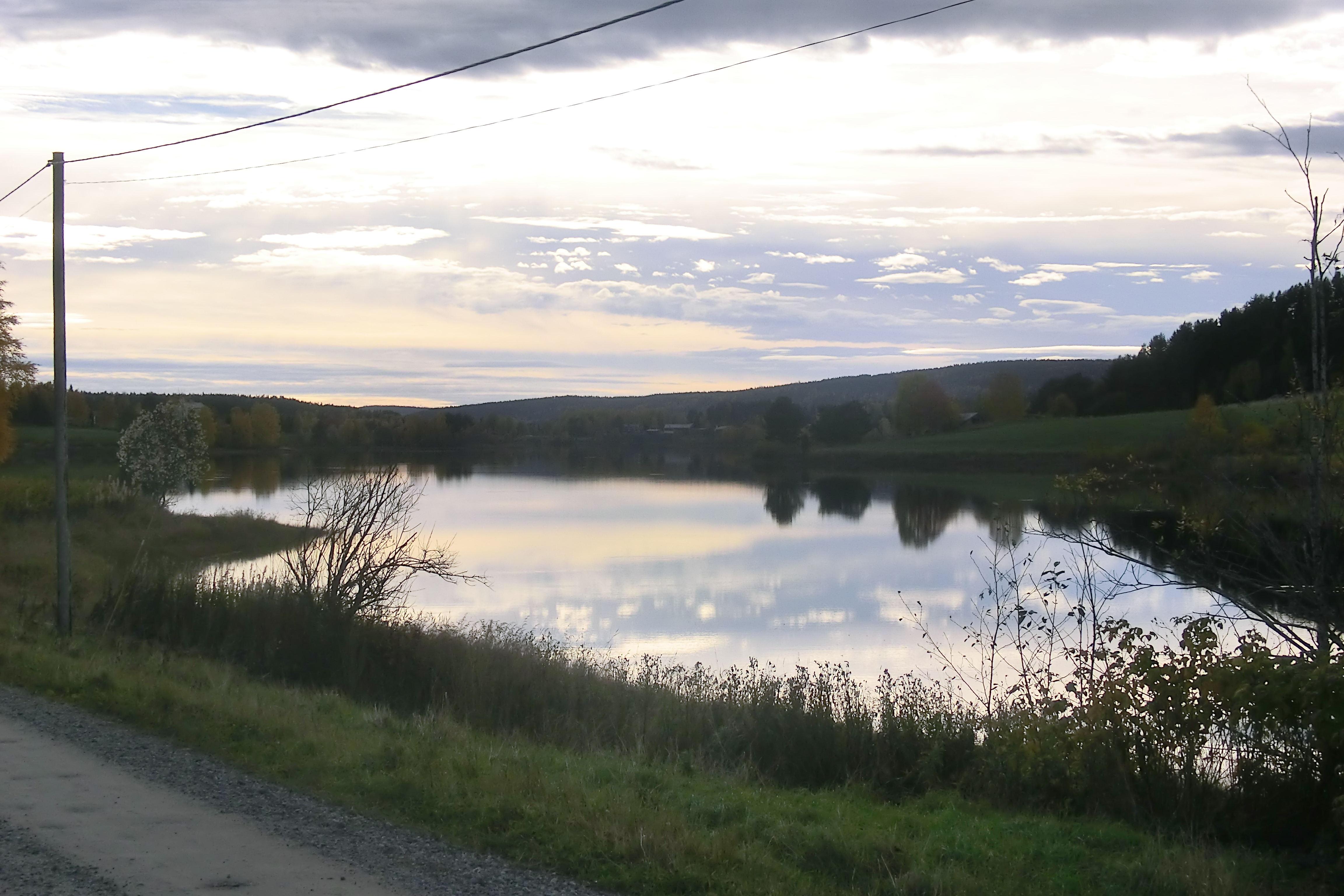 Dämstasjön